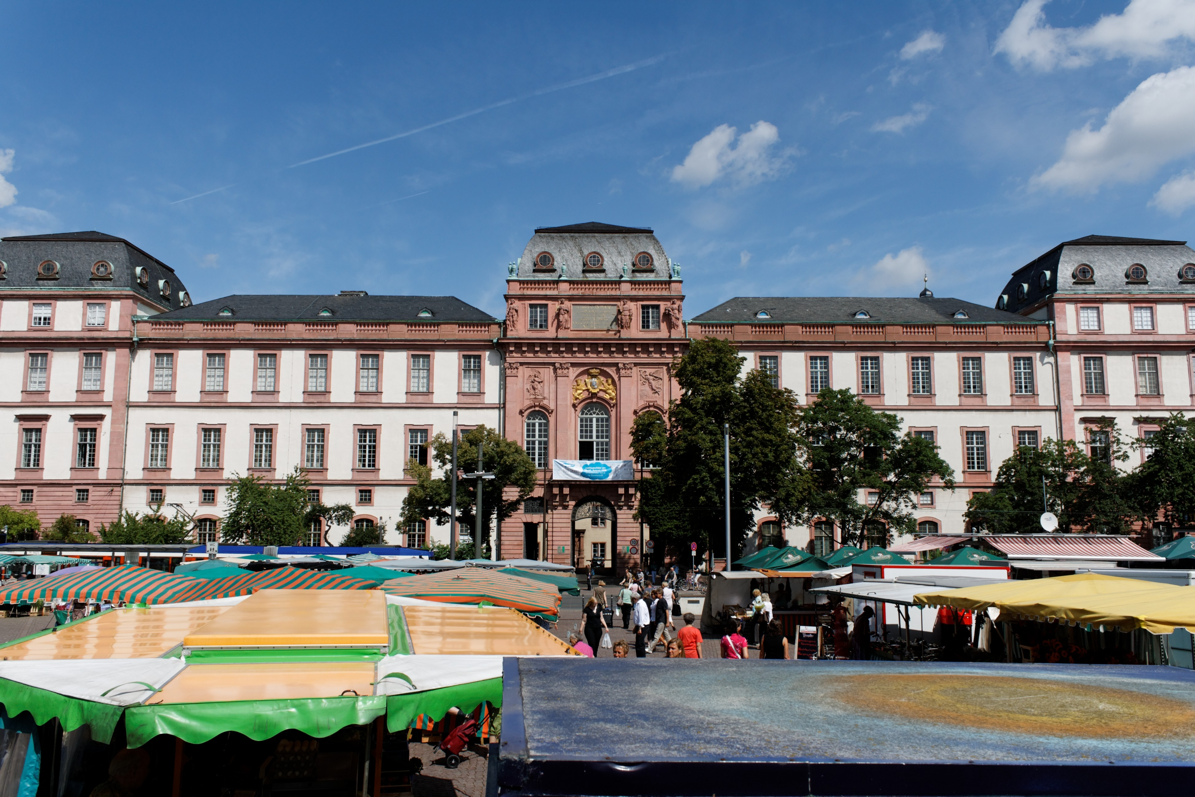 Südseite des Residenzschlosses Darmstadt